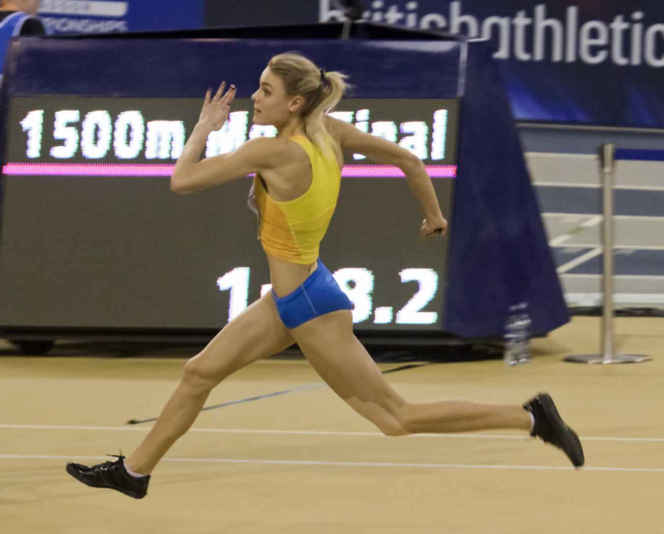 EKI30500 hoog dames levchenko